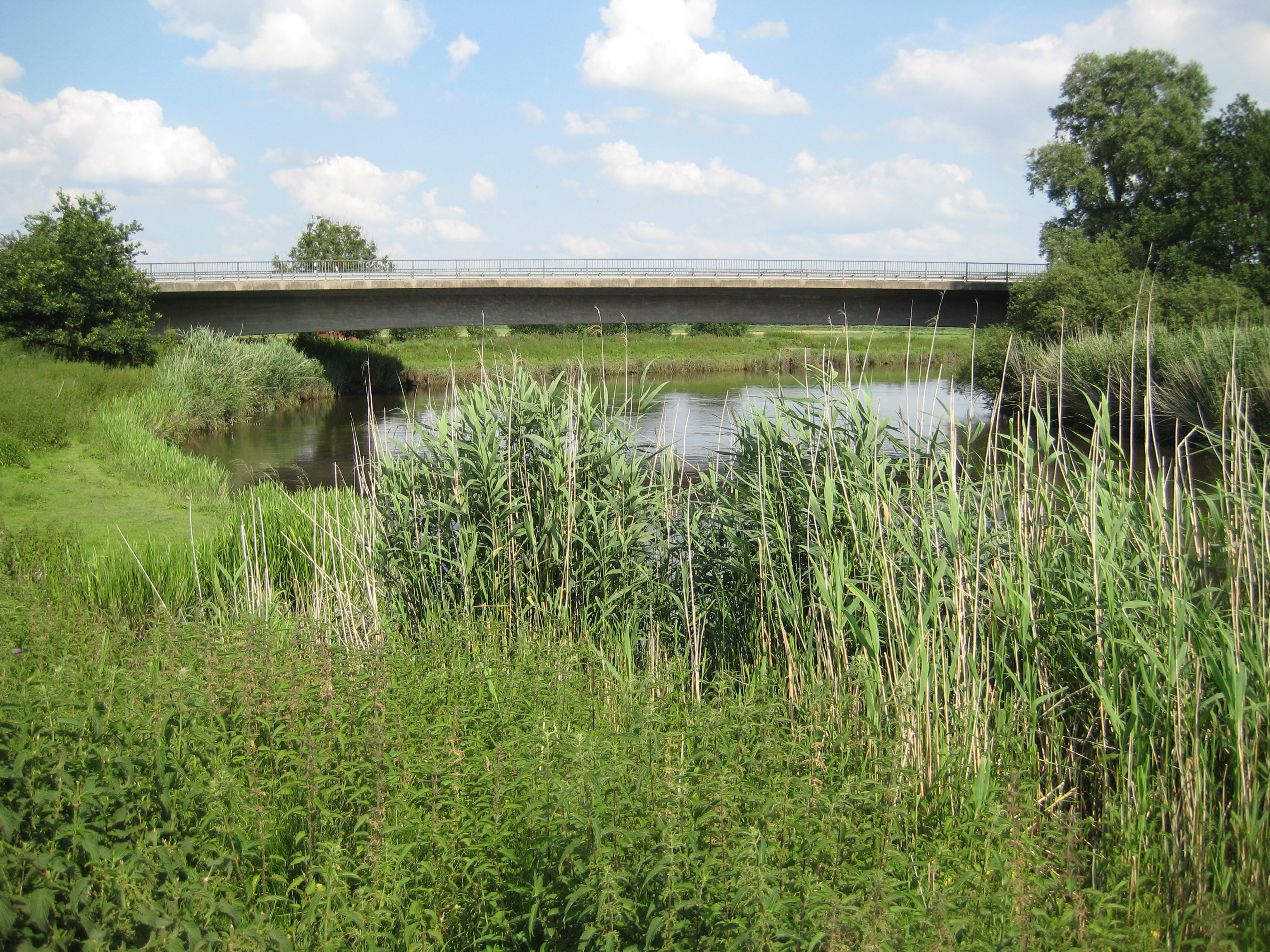 Brücke Breitenburger Fähre über die Stör